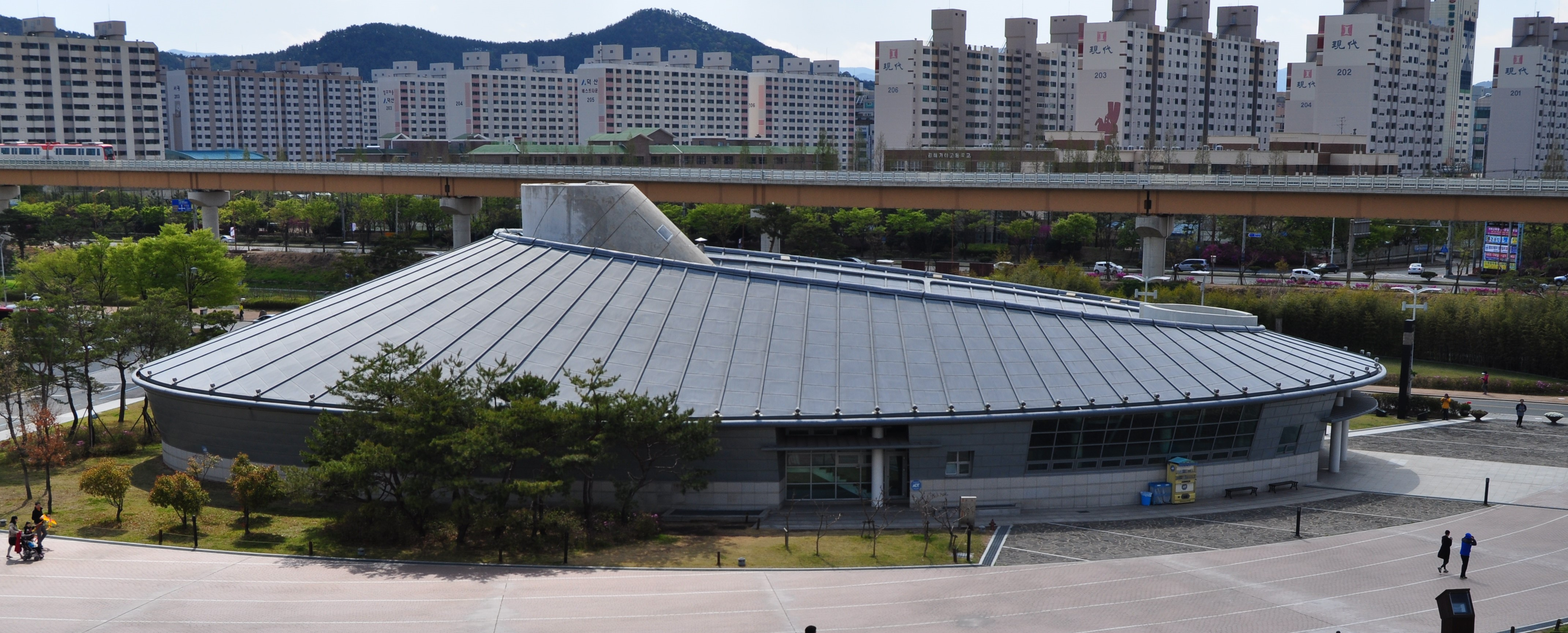 김해 대성동 소재, 대성동고분박물관